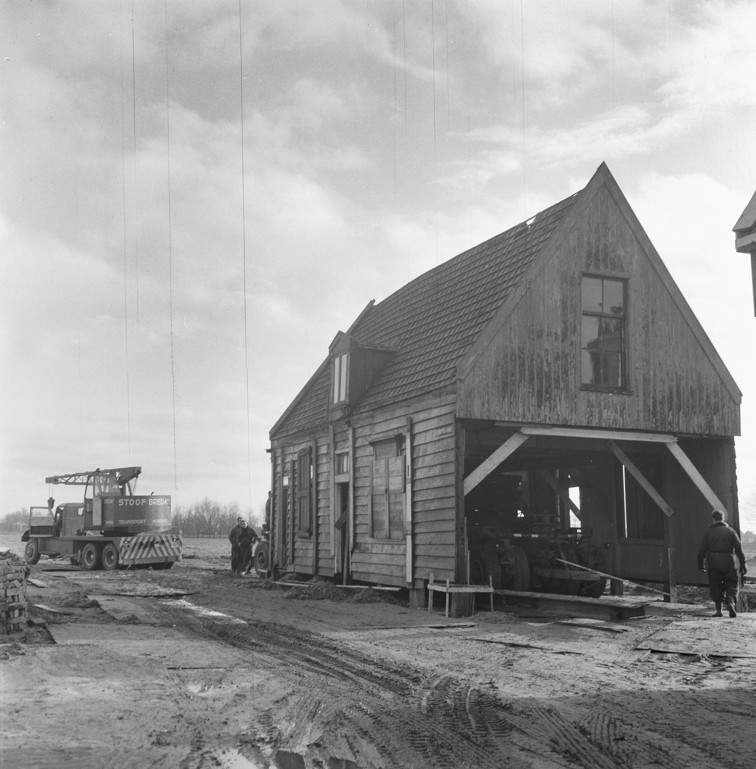 tijdens plaatsing aan Zaansche Schans This is a possible Rijksmonument: Find the monument in the Monuments database: Sint Catharijnepad in Zaandam All Rijksmonumenten in Zaandam Is this a Rijksmonument? Yes No More information about this project and help. More images to work at in Category:Possible Rijksmonumenten.